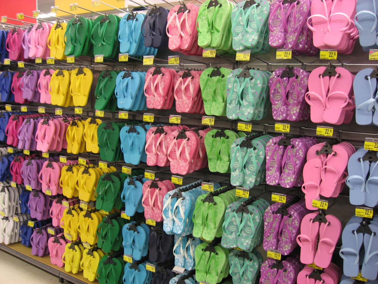 Loja de Havaianas em São Paulo, Brasil.